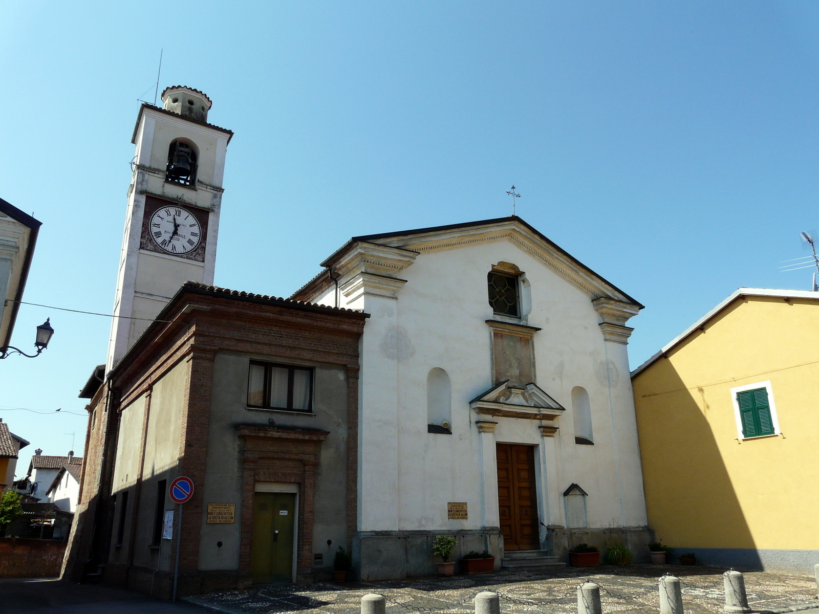 La chiesa di San Martino, Pasturana, Piemonte, Italia